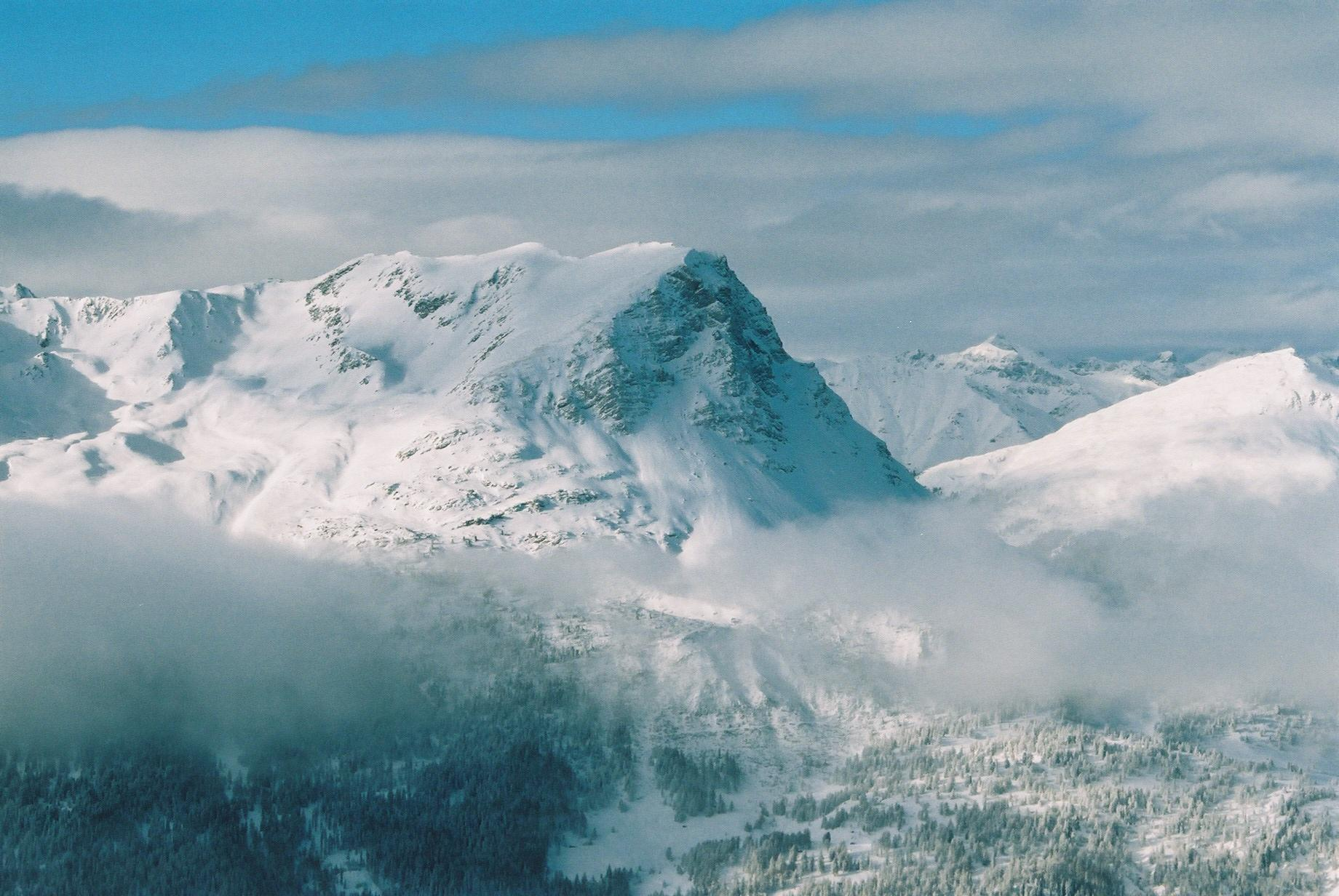 Piz Lad Hausberg Nauders im Dreiländereck Österreich Schweiz Italien